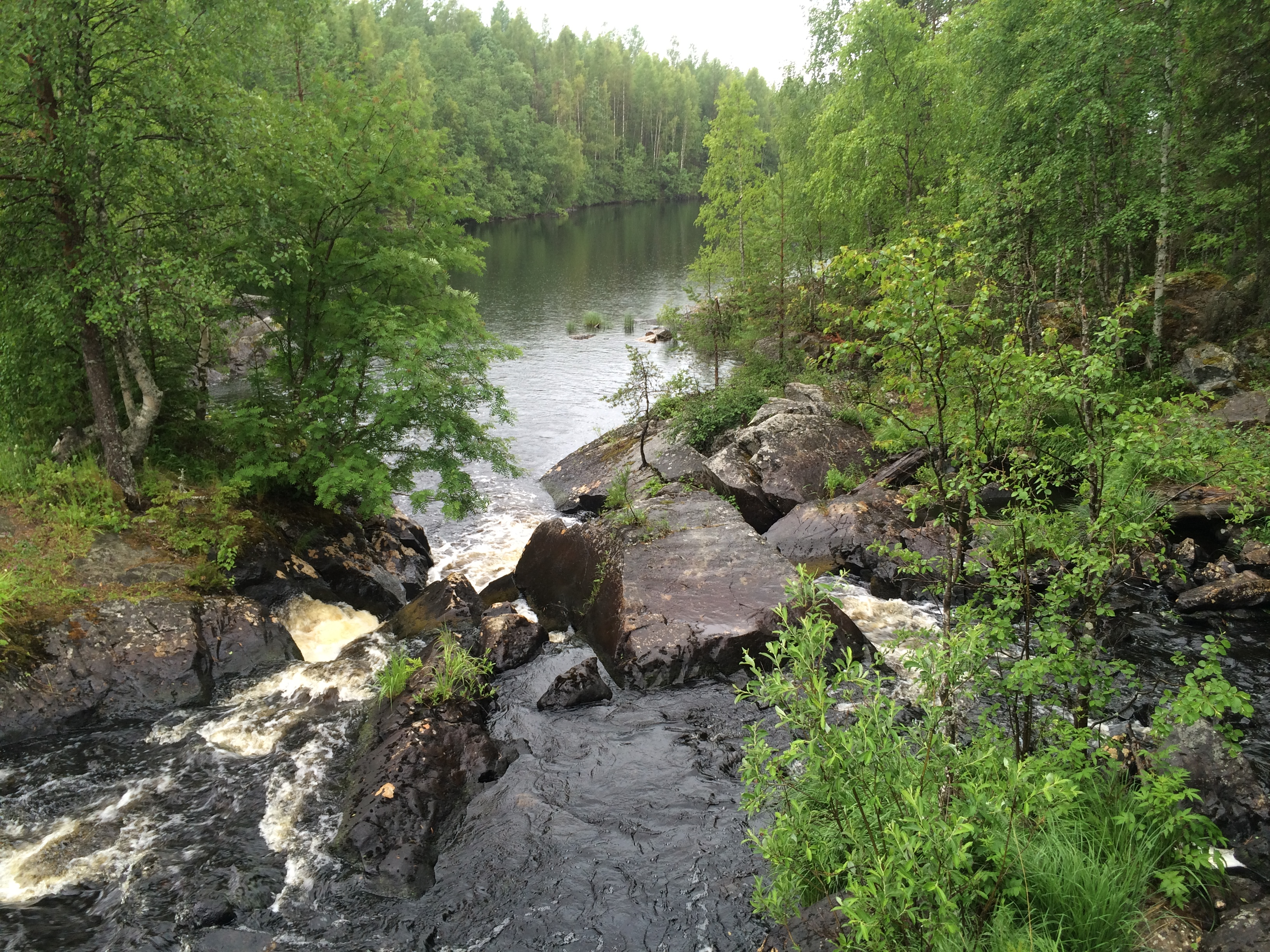 Гормозерка